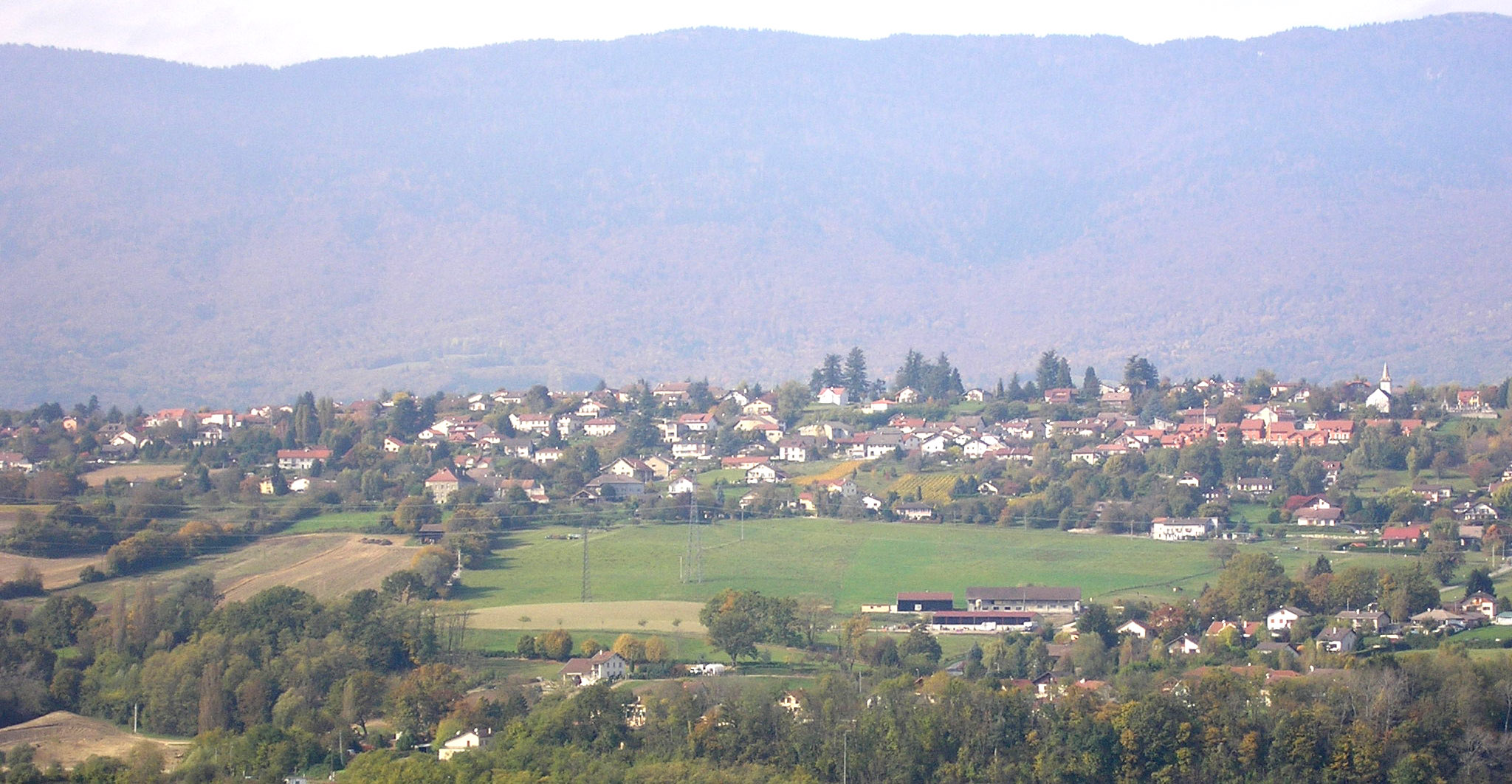 Le village de Challex dans l'Ain, vu depuis Avully.